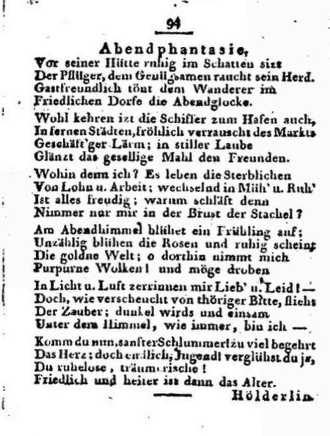 Abendphantasie. Aus: Brittischer Damenkalender und Taschenbuch für das Jahr Achtzehenhundert. Mit Kupfern. Frankfurt am Main. In der Jaegerschen Buchhandlung.